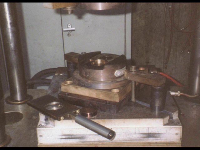 Pressform